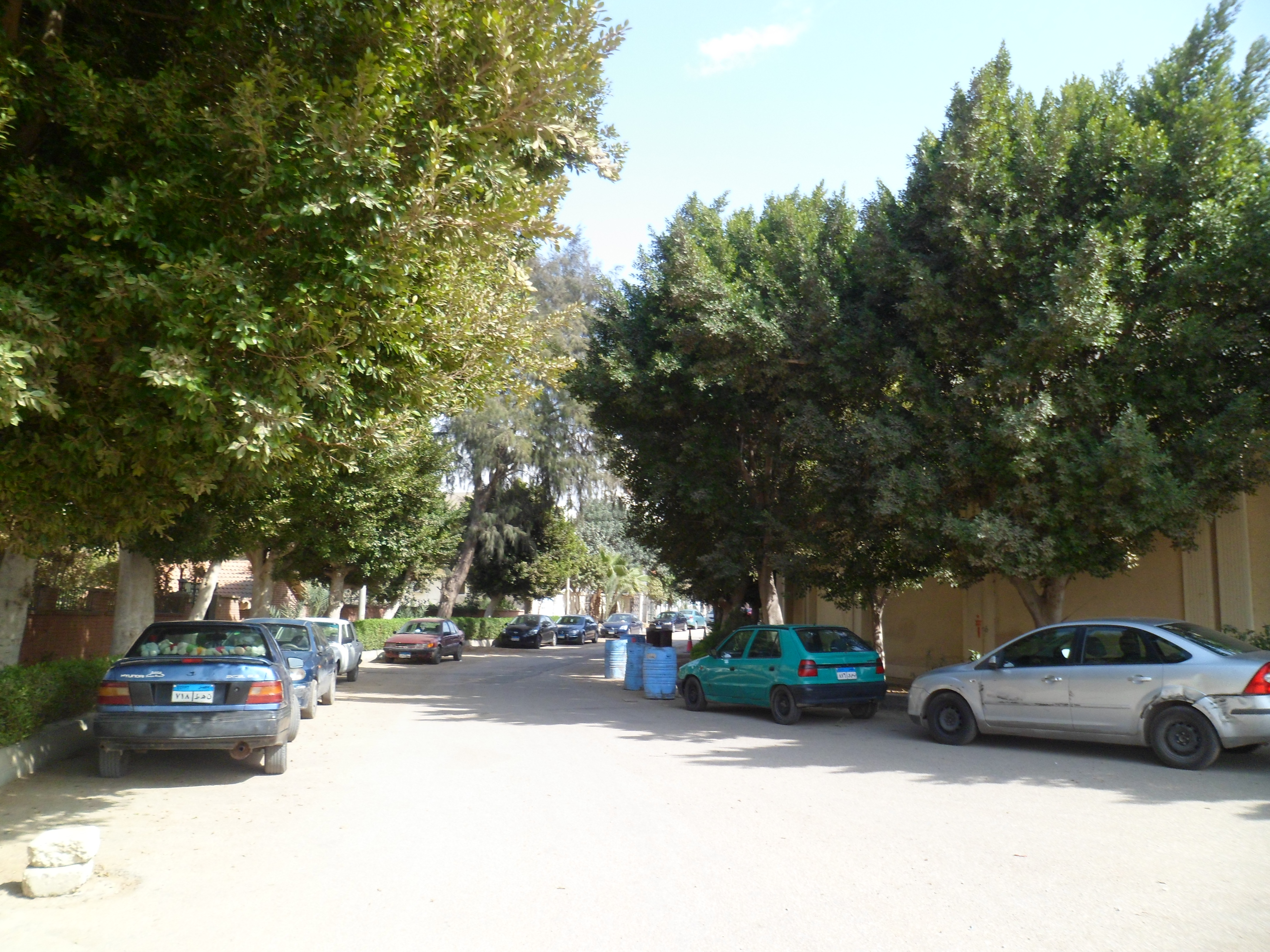 شارع رقم 8 بالمقطم.